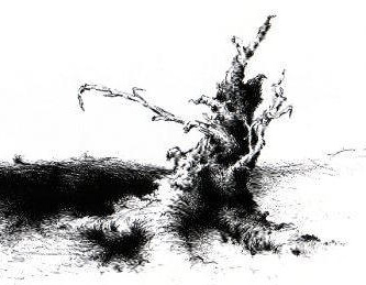 עץ גווע בדיונות